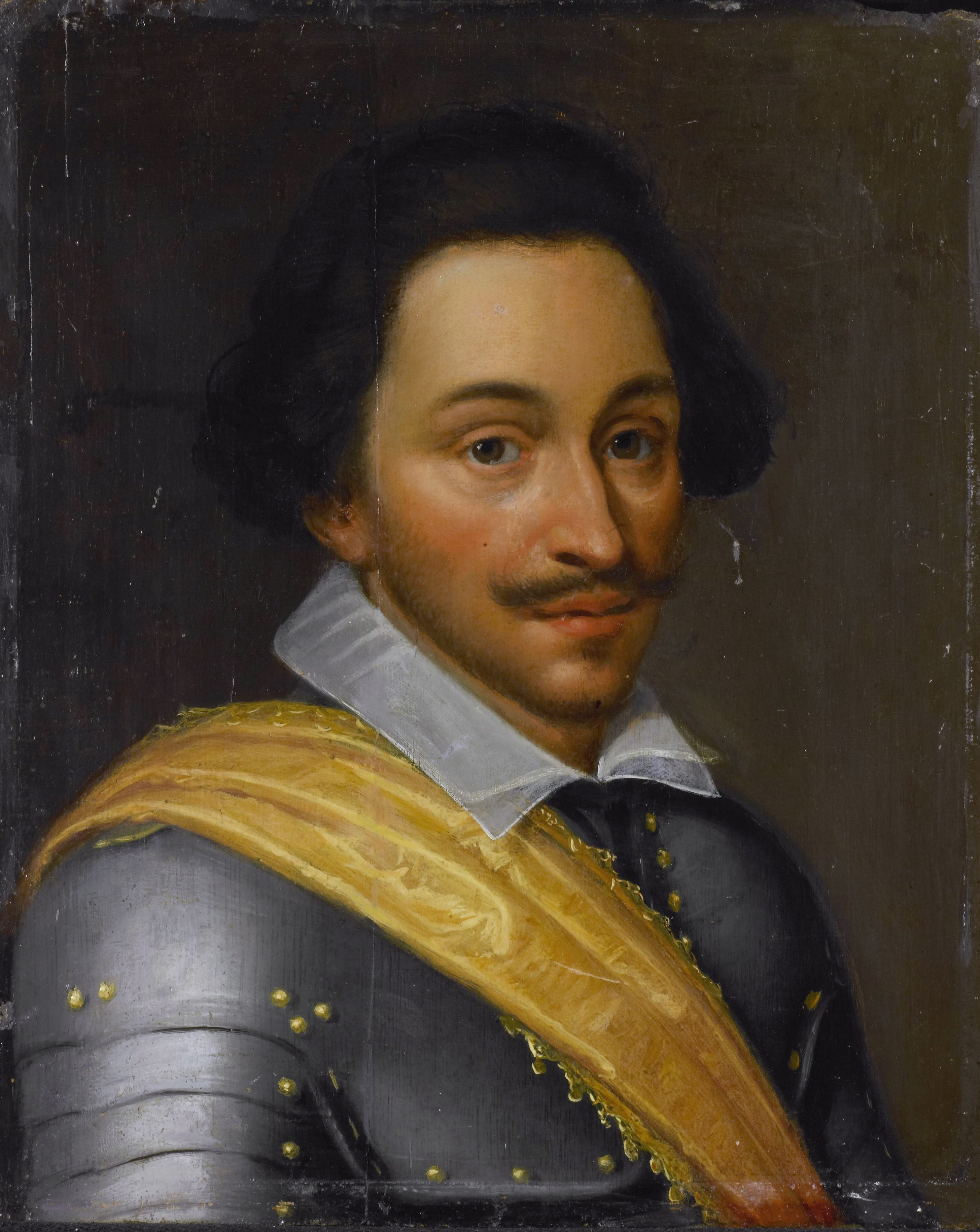 Part of the Katzenelnbogen Series